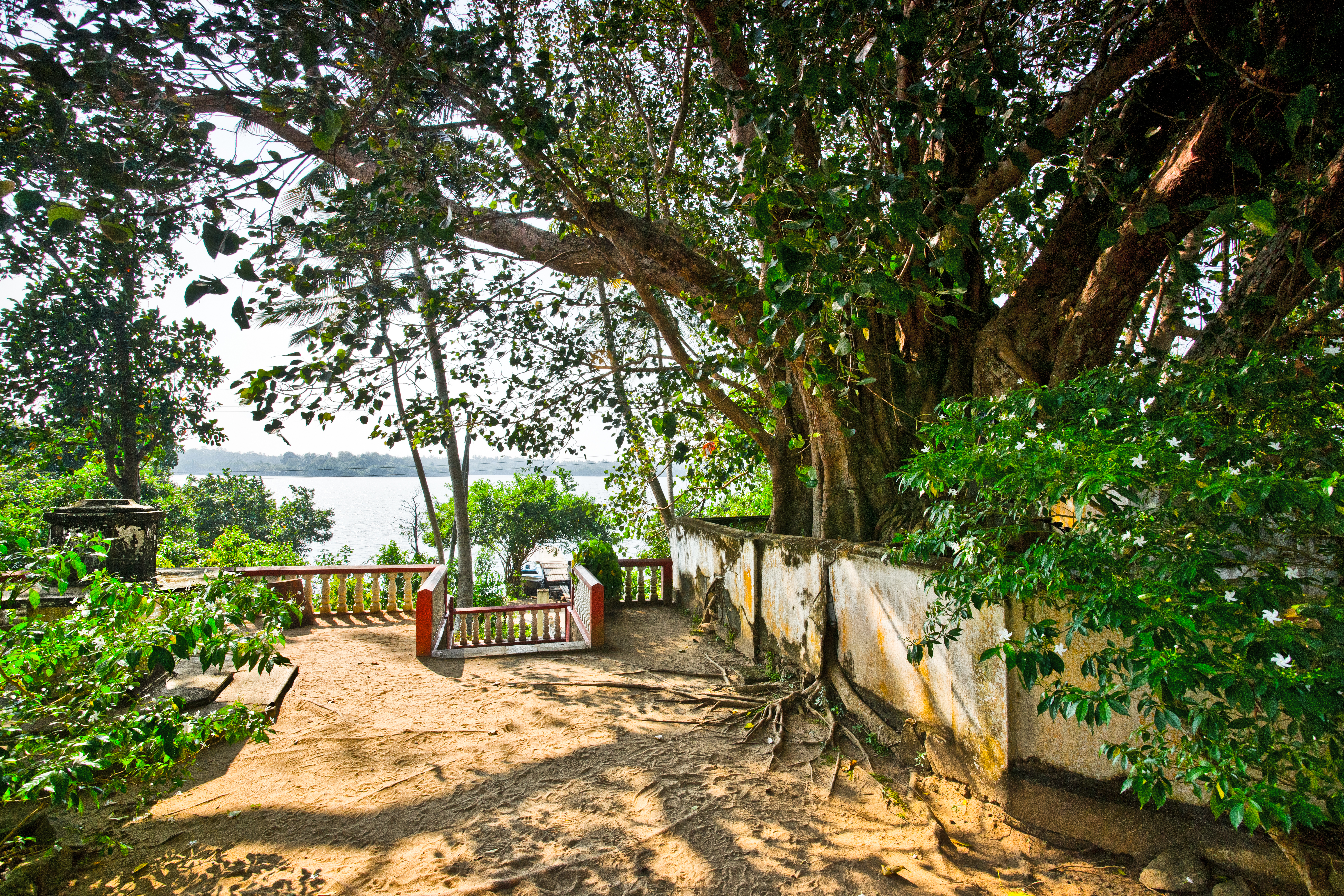 Bodhi Baum in einem Tempel in Sri Lanka, mit der typischen Einfriedung